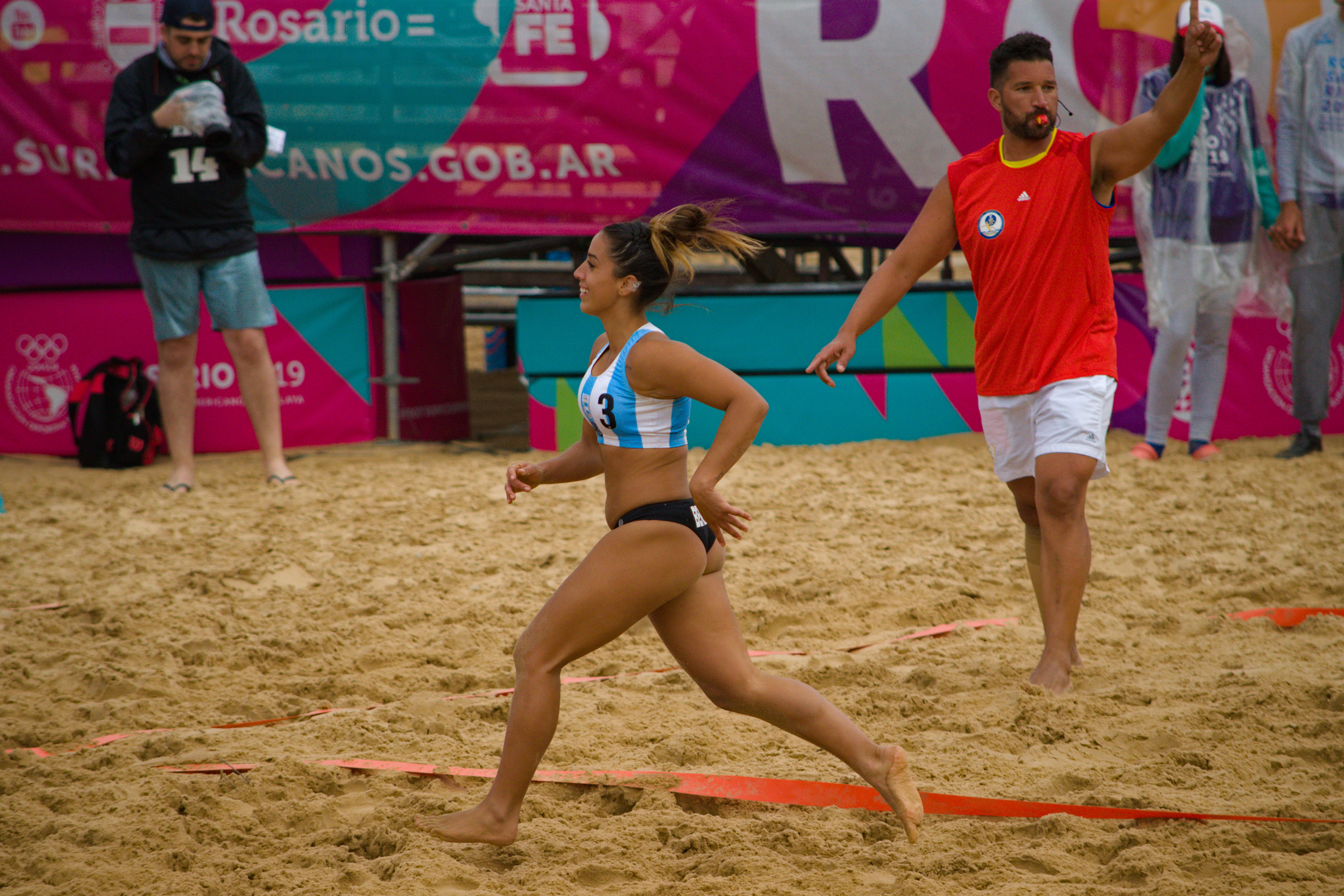 Partido por la final femenina de handball entre Argentina y Brasil en los Juegos Suramericanos de Playa 2019